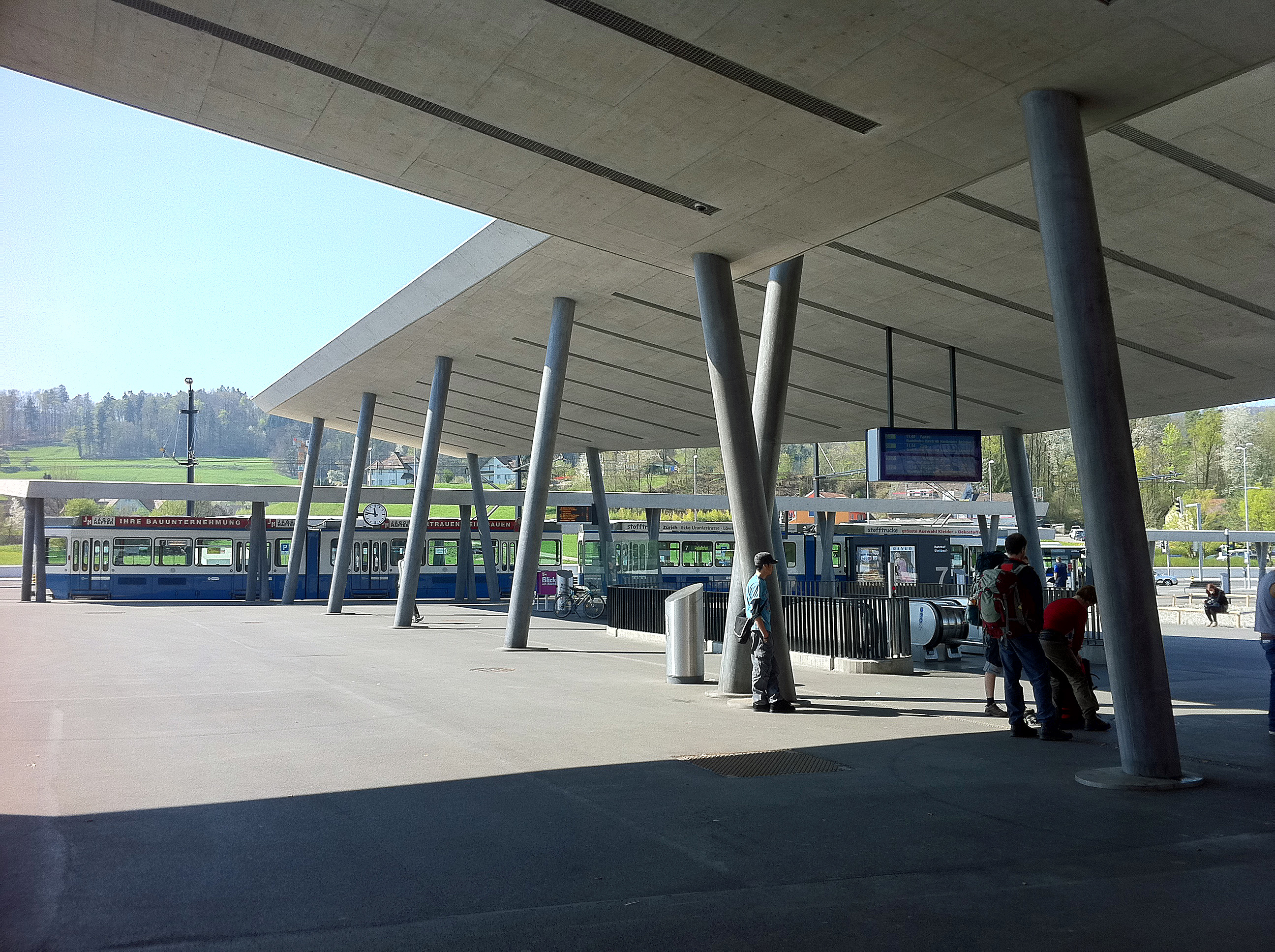 Bahnhof Stettbach – Zürich-Schwammendingen / Dübendorf – umgebauter oberirdischer Teil und Zugang zu den unterirdischen Perrons